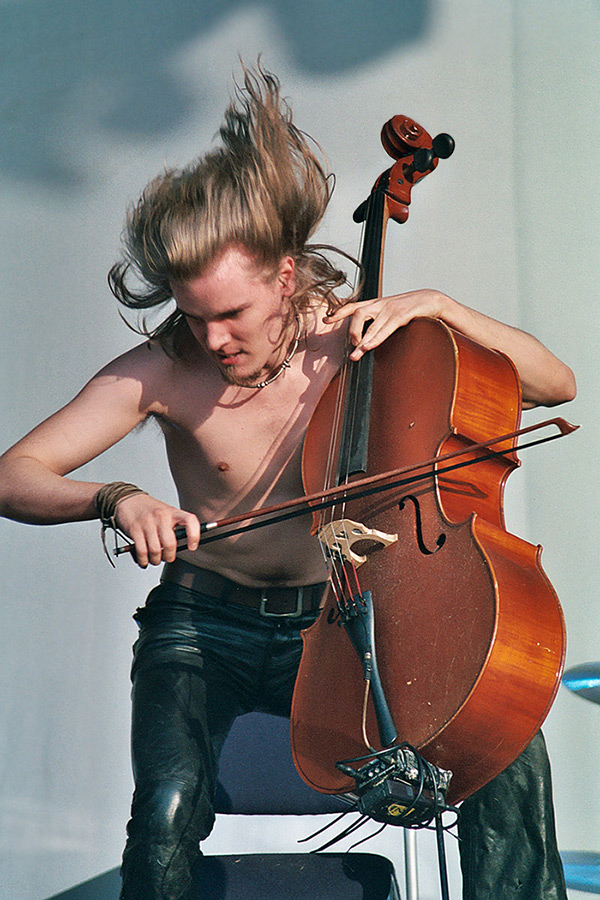 Perttu Kivilaakso of Apocalyptica bei einem Konzert bei dem Festival Mera Luna in Hildesheim 2003.